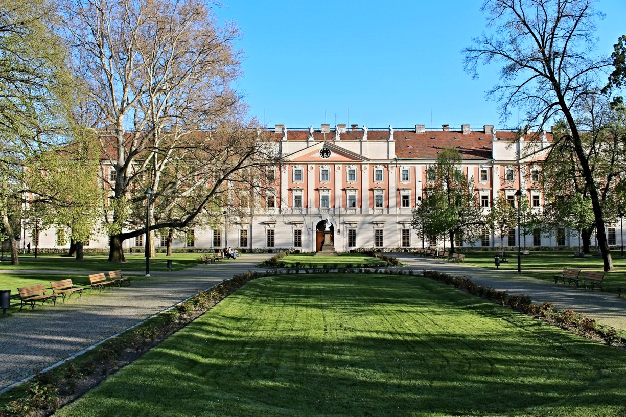 Invalidovna v Praze